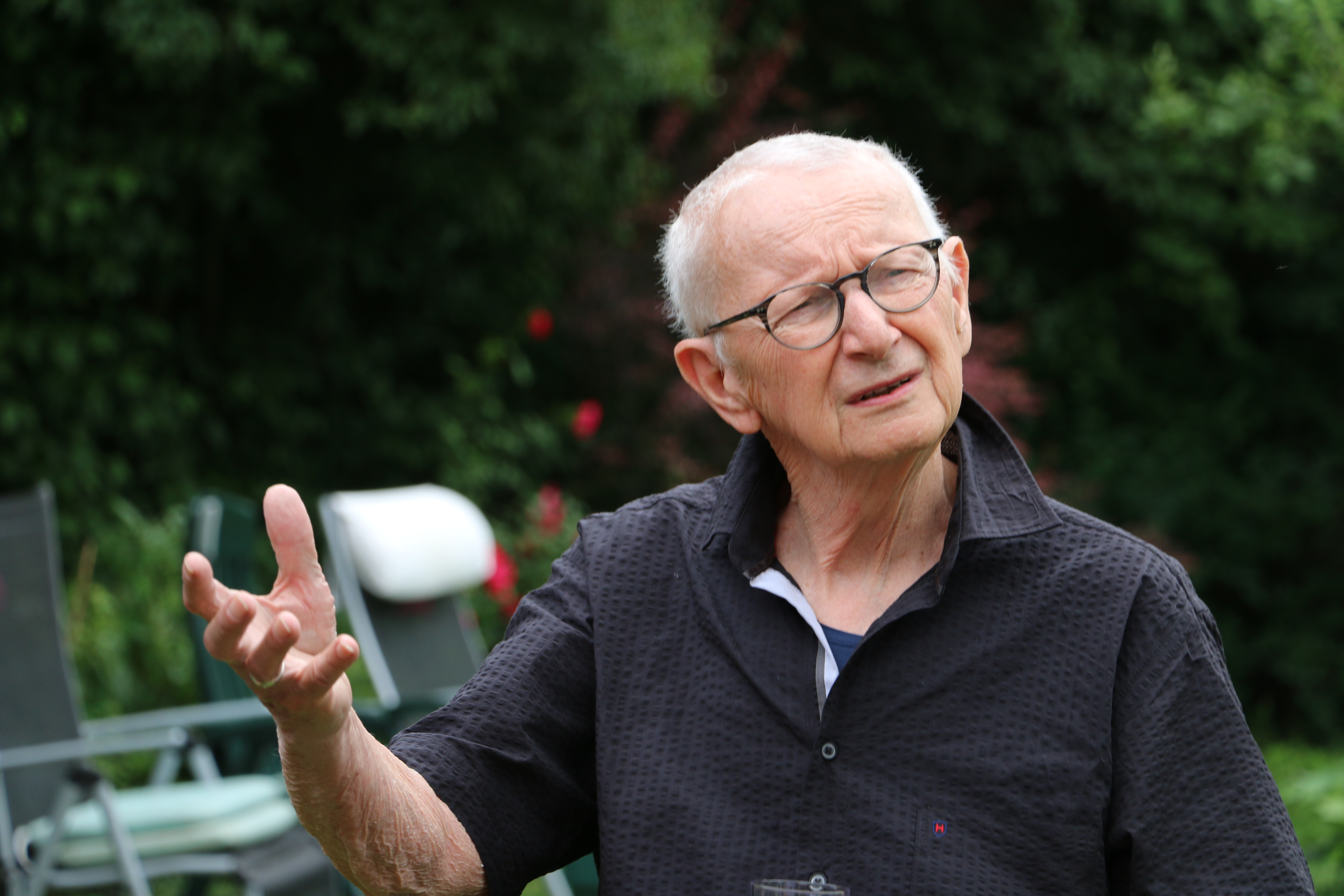 Prof. Dr. Klaus Welke im Juli 2020; Foto: Hartmut Lenk